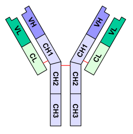 Schéma d'un anticorps Auteur : Yohan Source : Crée avec Flash5 Yohan